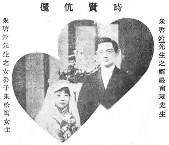 治家全書圖像